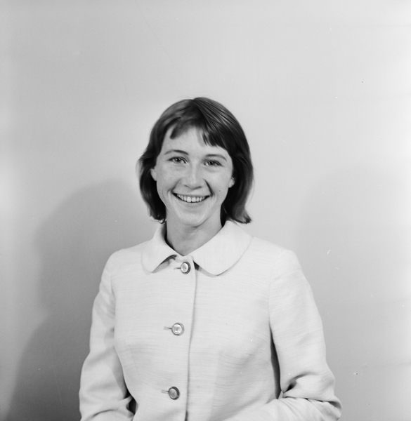 Skuespilleren Liv Thorsen i 1959